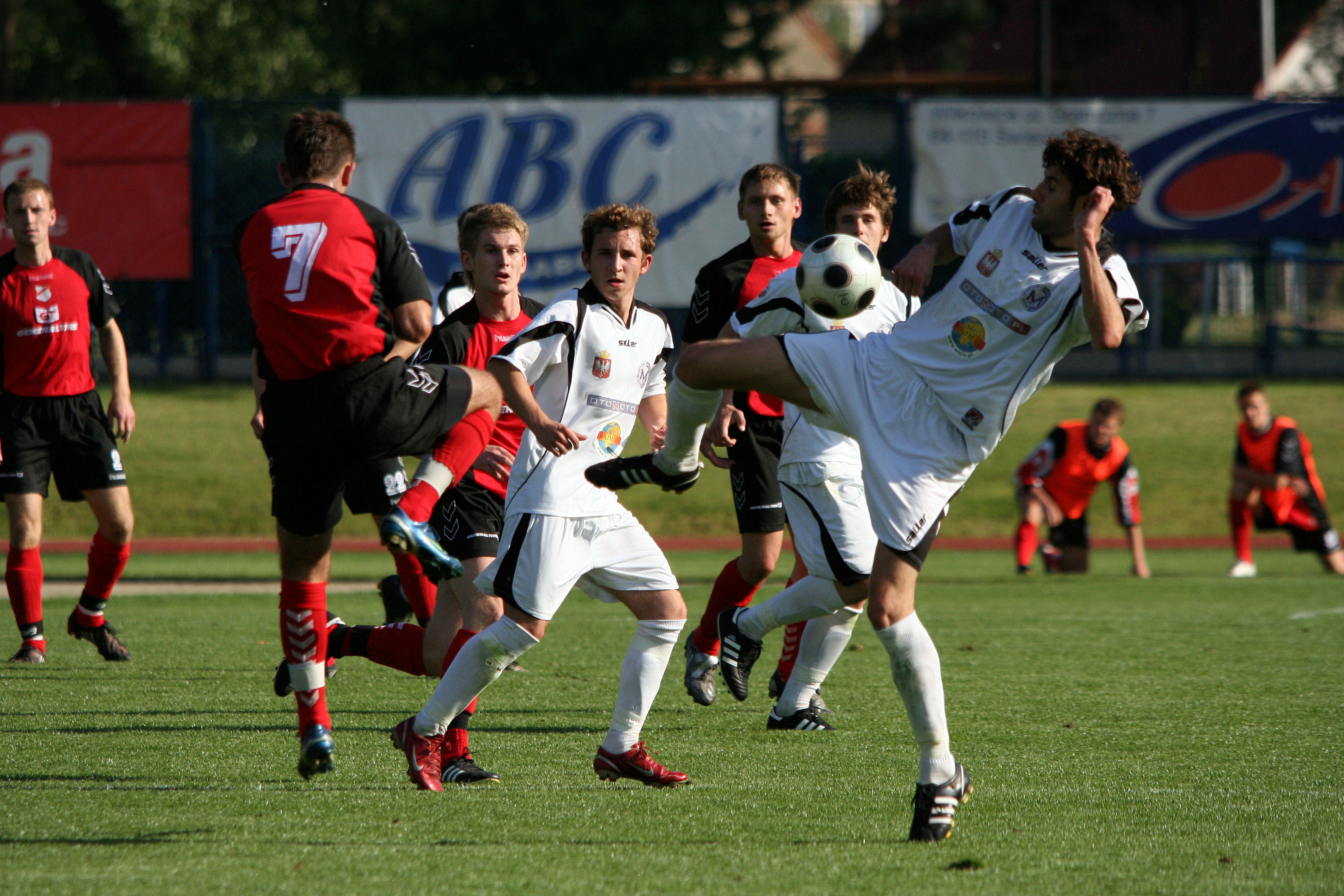 jw.